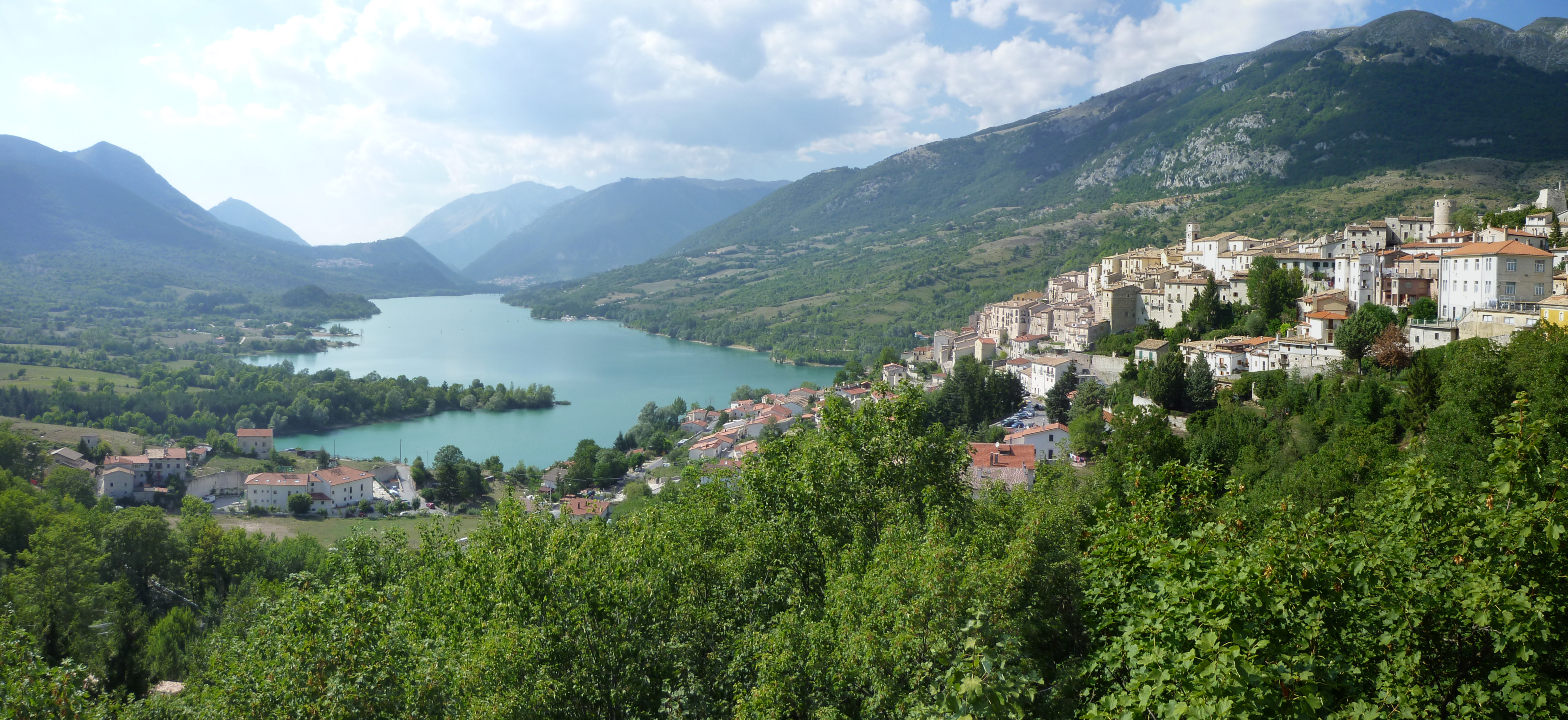 Veduta di Barrea e dell'omonimo lago. Barrea, L'Aquila.